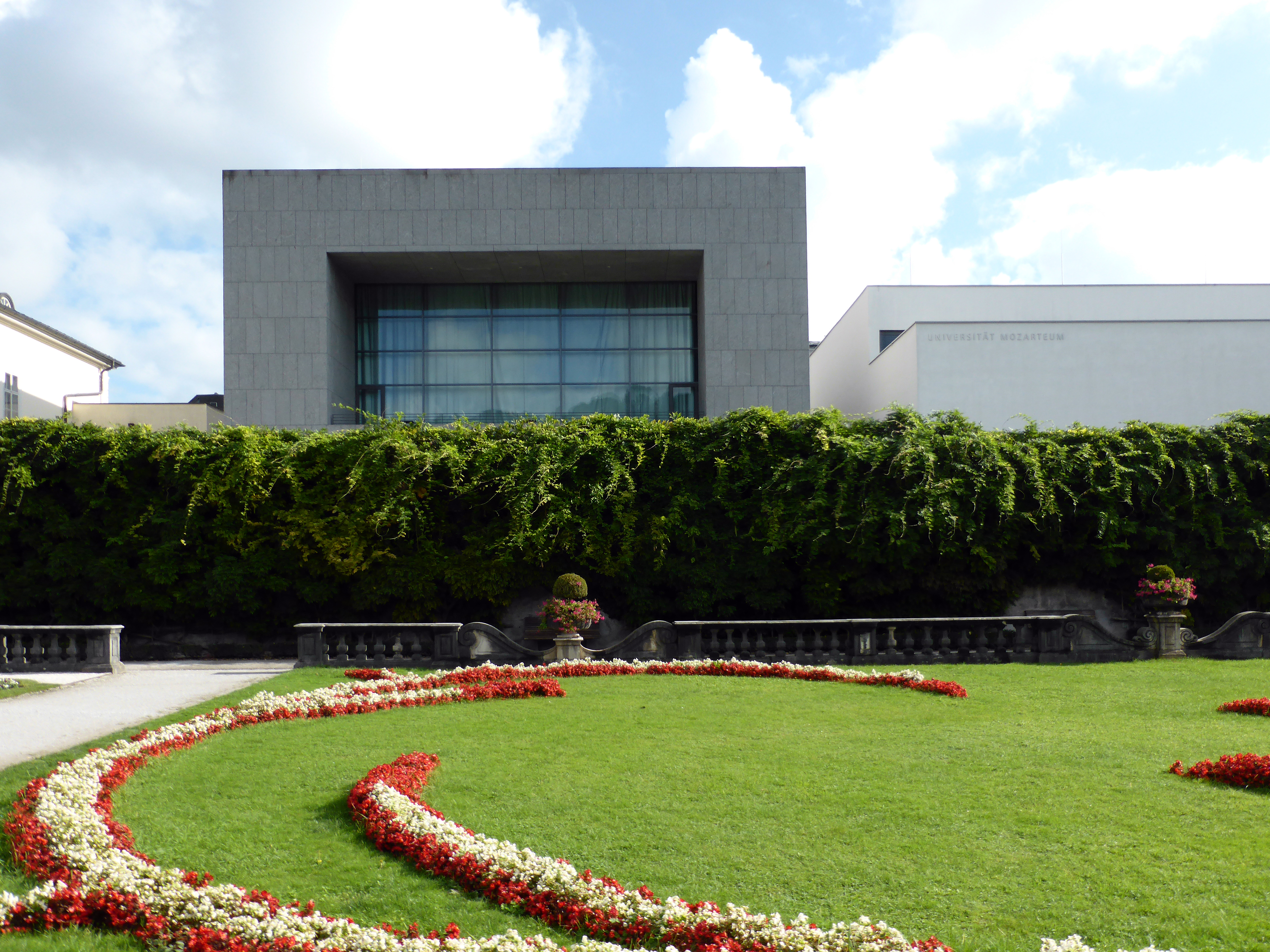 Neubau der Universität Mozarteum, Salzburg.